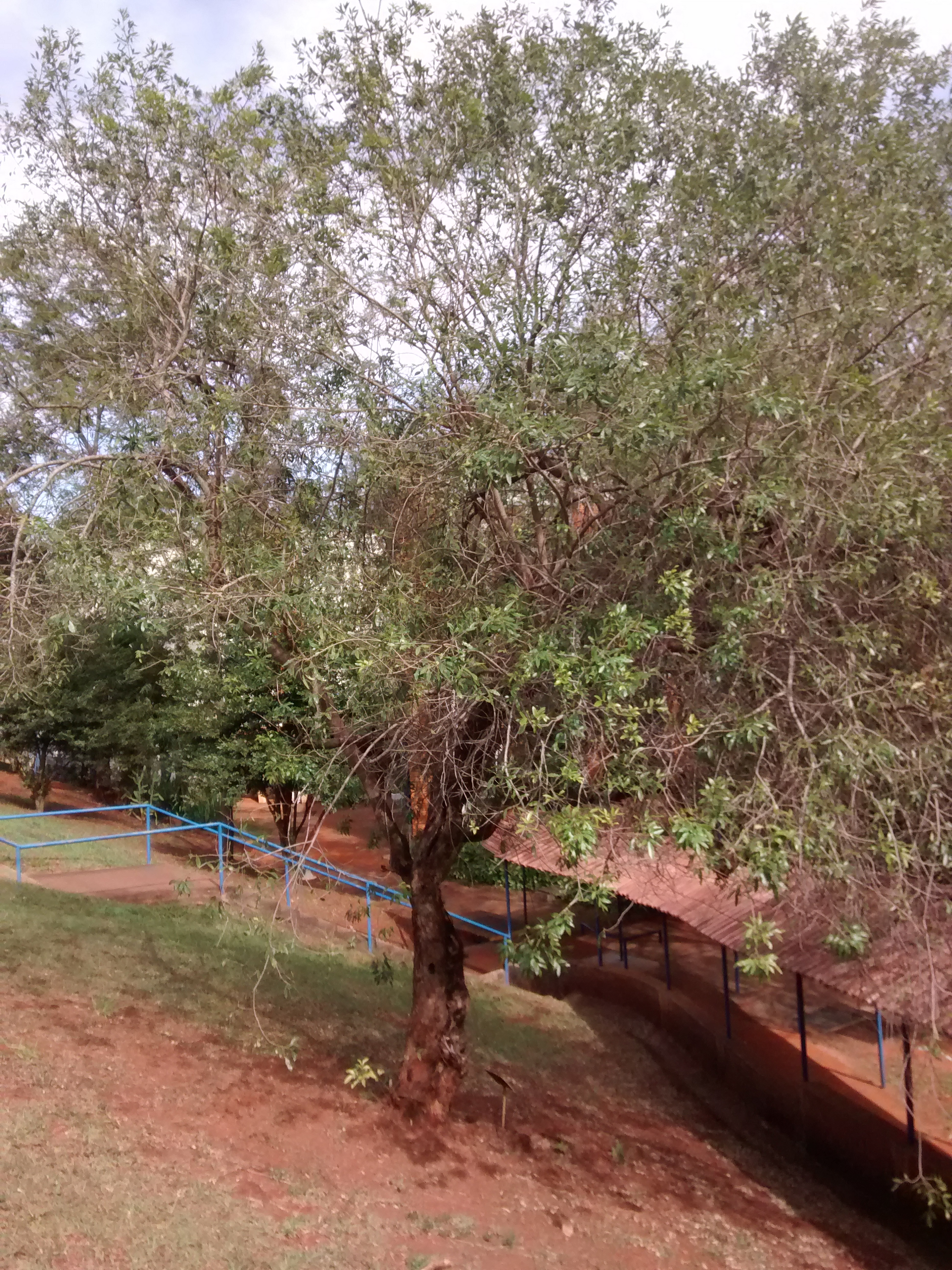 Lithraea molleoides - whole at FE unicamp, Campinas (SP) Brasil.